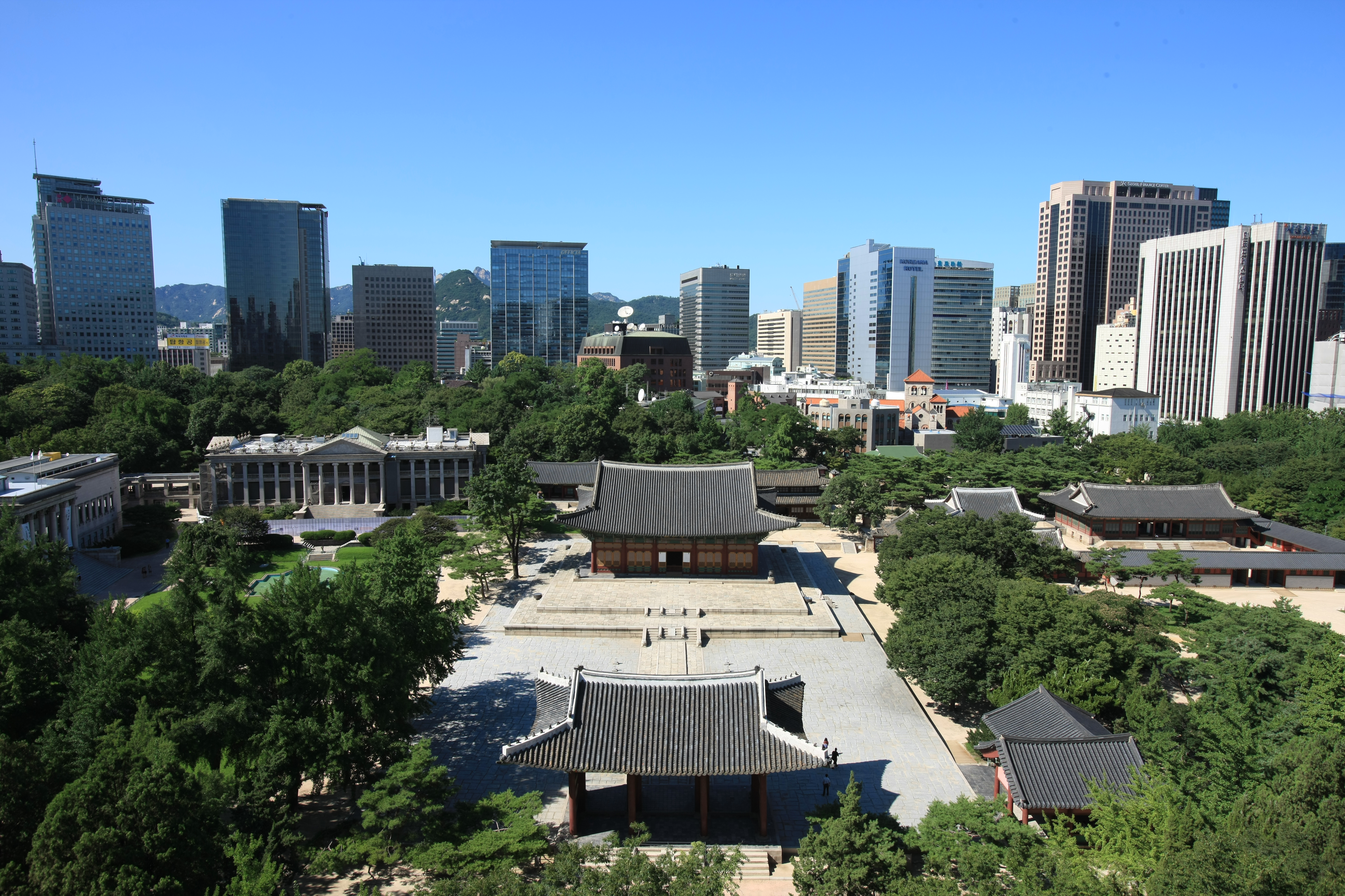 Photos of Seoul Metropolitan Fire & Disaster Headquarters